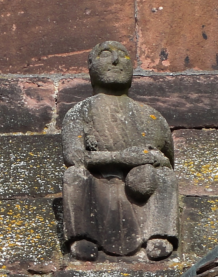 Alsace, Haut-Rhin, Église Saint-Léger (XIIIe) de Guebwiller (PA00085440, IA00054831).Statue de mendiant (représentation médiévale d'un Juif).